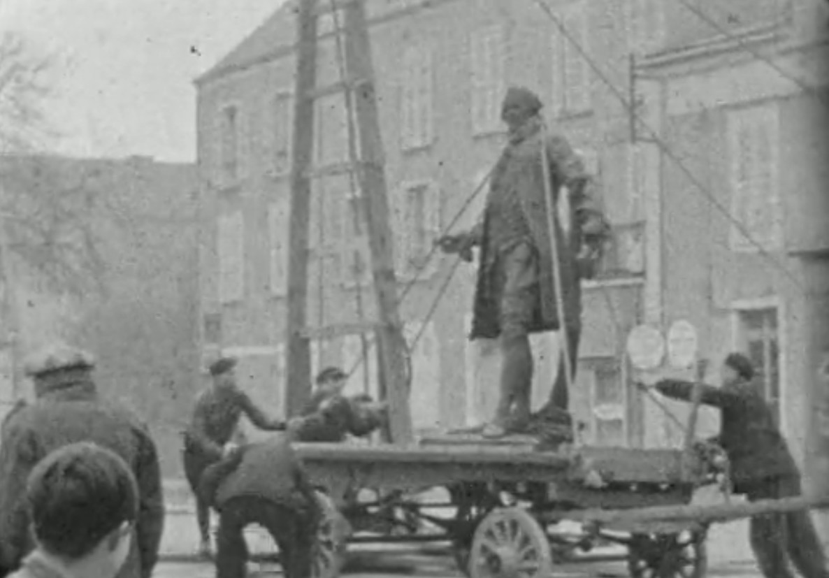 Déplacement de la statue de Henri Duhamel du Monceau à Pithivier le 19 février 1942 pour récupérer des métaux non ferreux destinés à l'industrie de guerre allemande. Après une souscription publique le Conseil Municipal décida d’installer la statue exécutée par Jules Blanchard le 19 février 1893